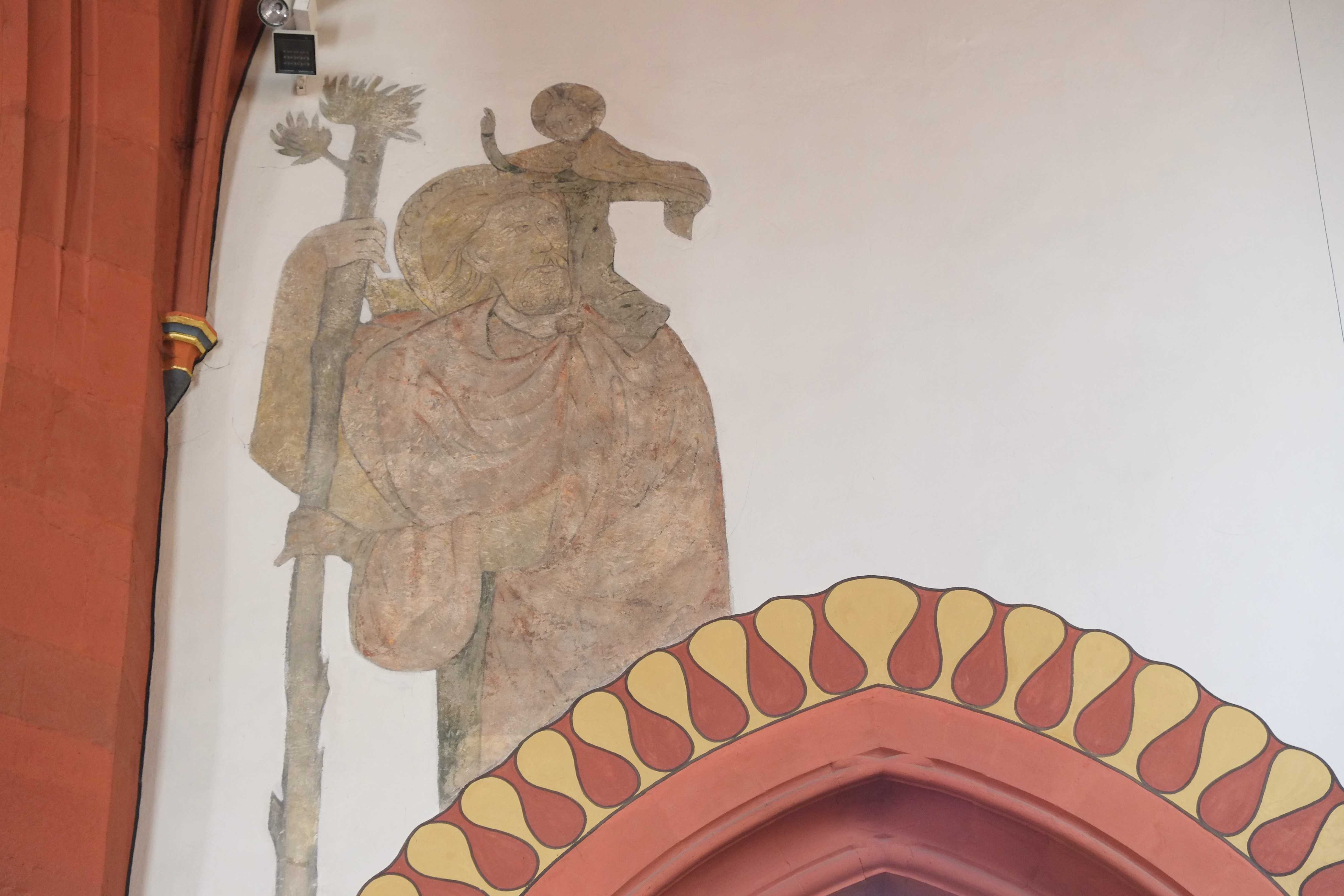 Katholische Pfarrkirche St. Andreas in Karlstadt im Main-Spessart-Kreis (Bayern, Deutschland), Wandmalerei im Chor, Darstellung: Hl. Christophorus